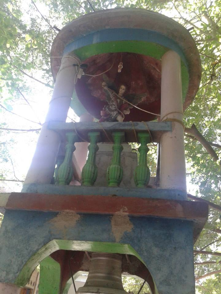 Igreja Sao Miguel, Padiae, Lalisuc